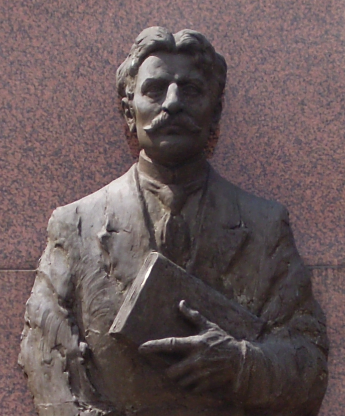 Popiersie Hieronima Derdowskiego z pomnika w Rumi